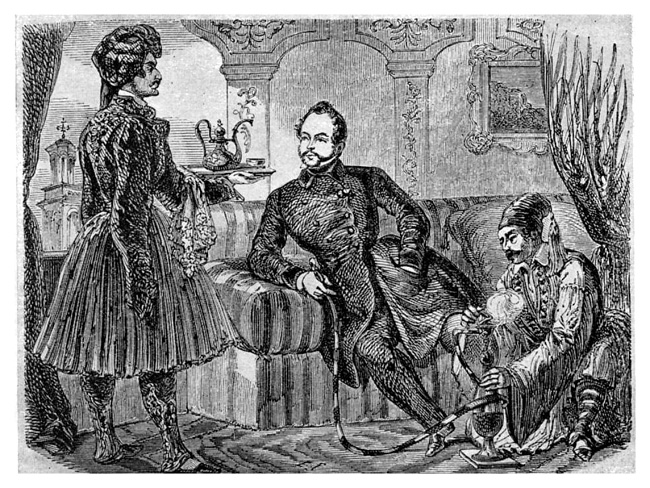 Valachie, view d'une habitation a Bucharest